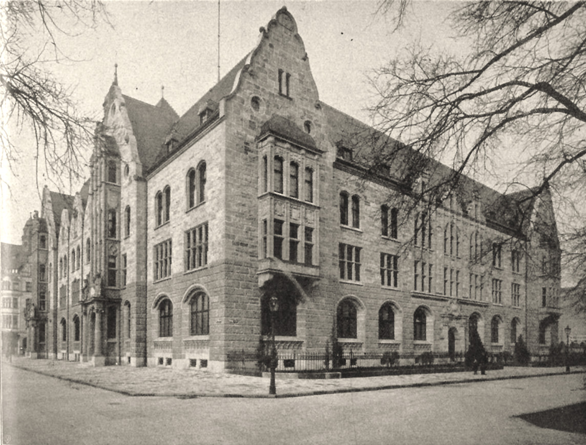 Oberpostdirektion zu Düsseldorf, Ansicht Carl-Theodor-Straße damals Ecke Königsallee - heute Graf-Adolf-Platz, Foto in 1908